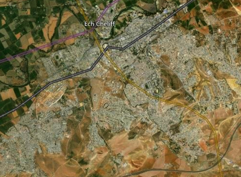 Chlef vue par satellite (NASA World Wind)